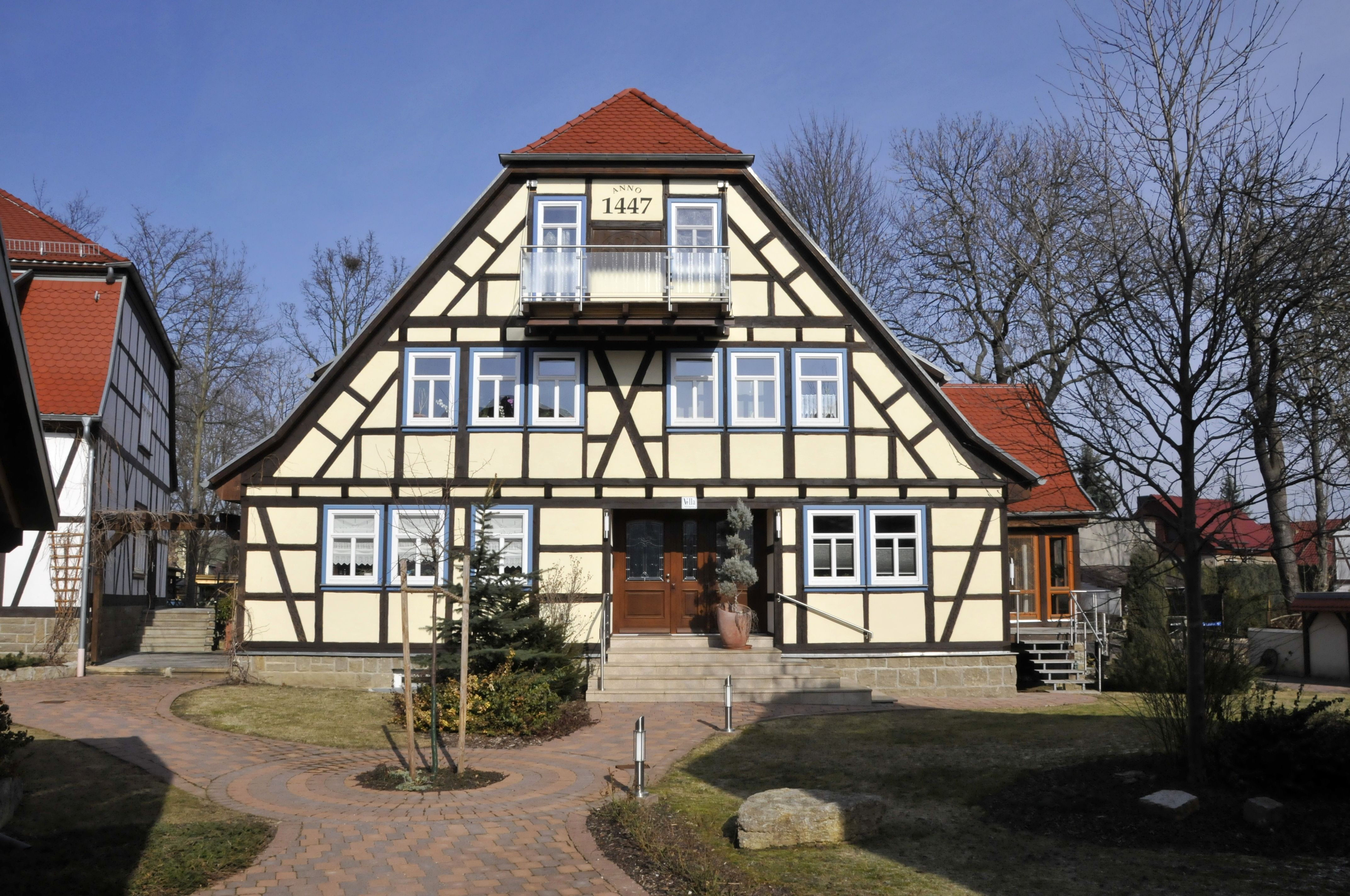 Ingersleben, Untermühle, Frontseite